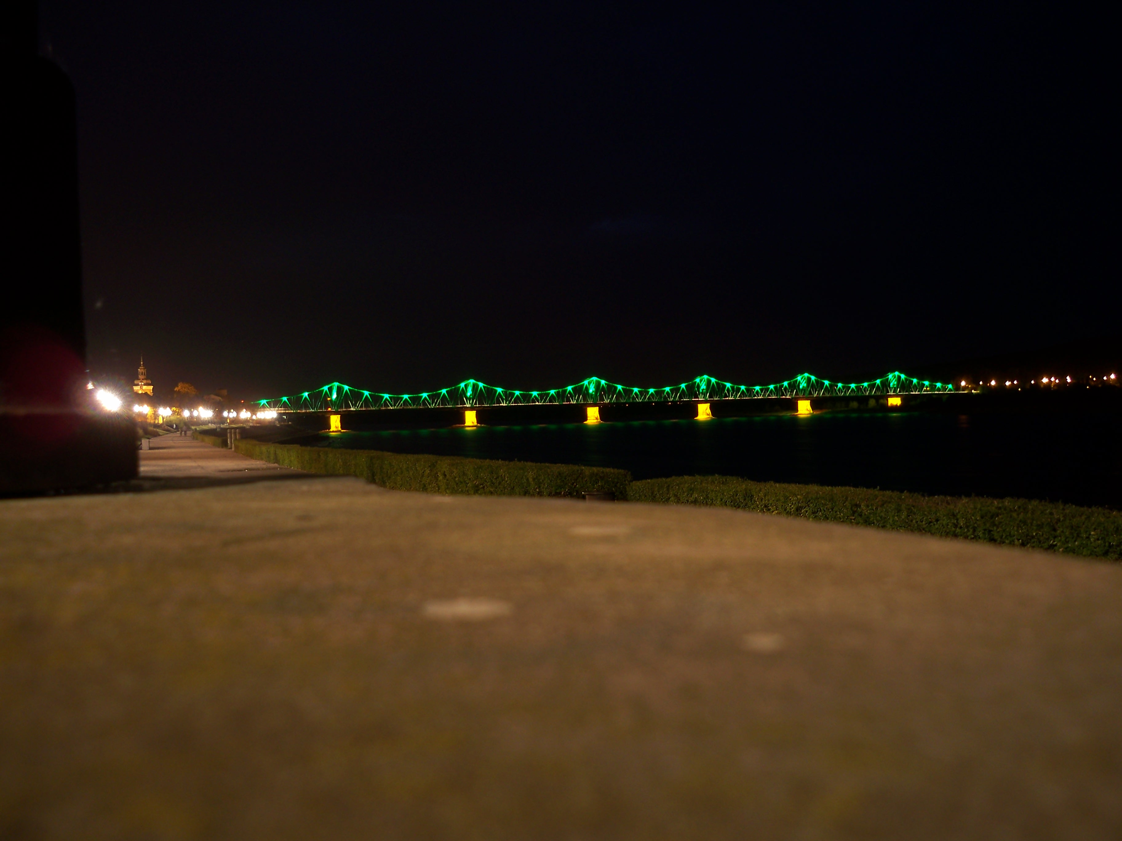 Włocławski most na Wiśle (2009 r.)